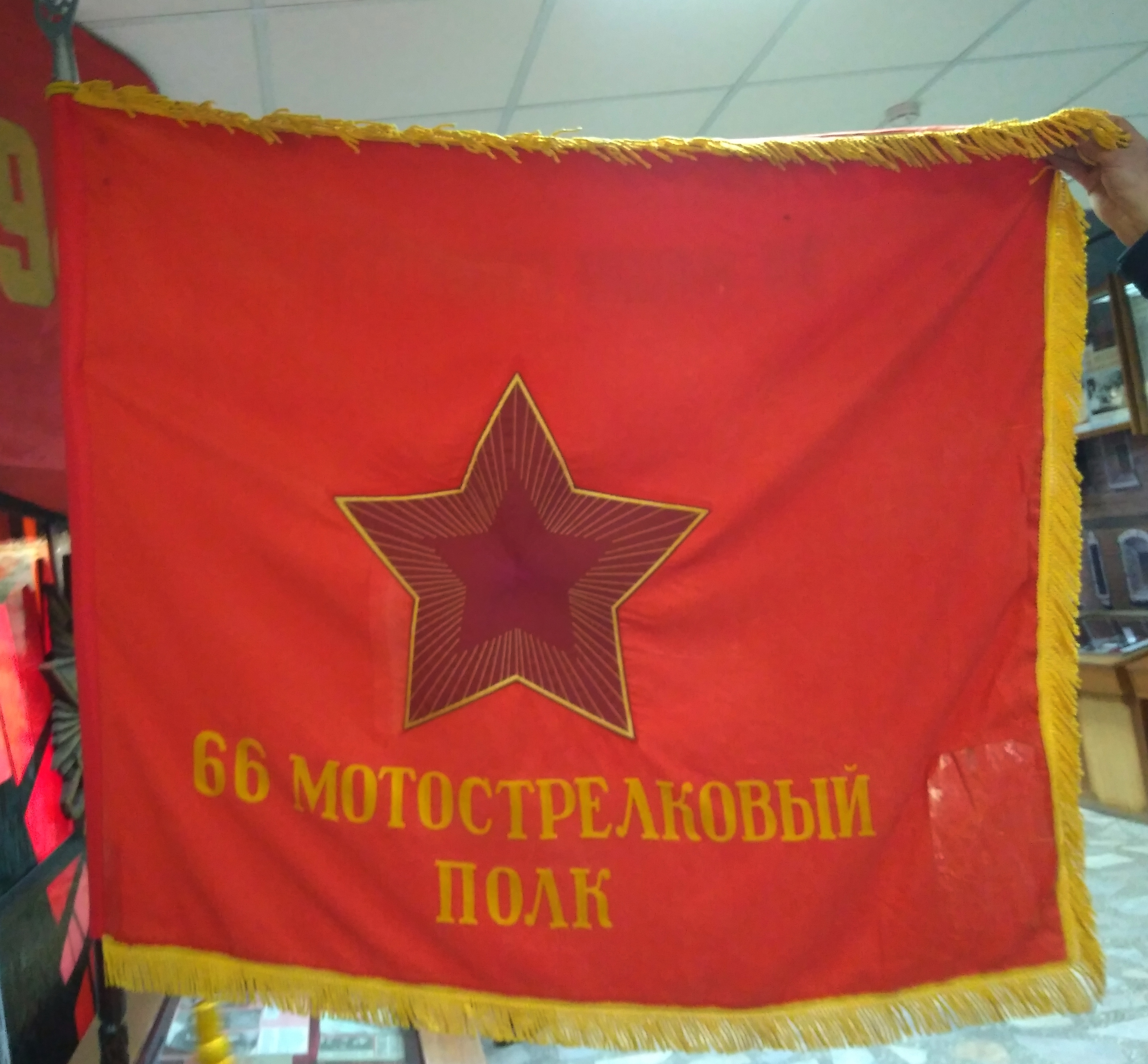 Экспозиция в музее Дома офицеров в Алматы